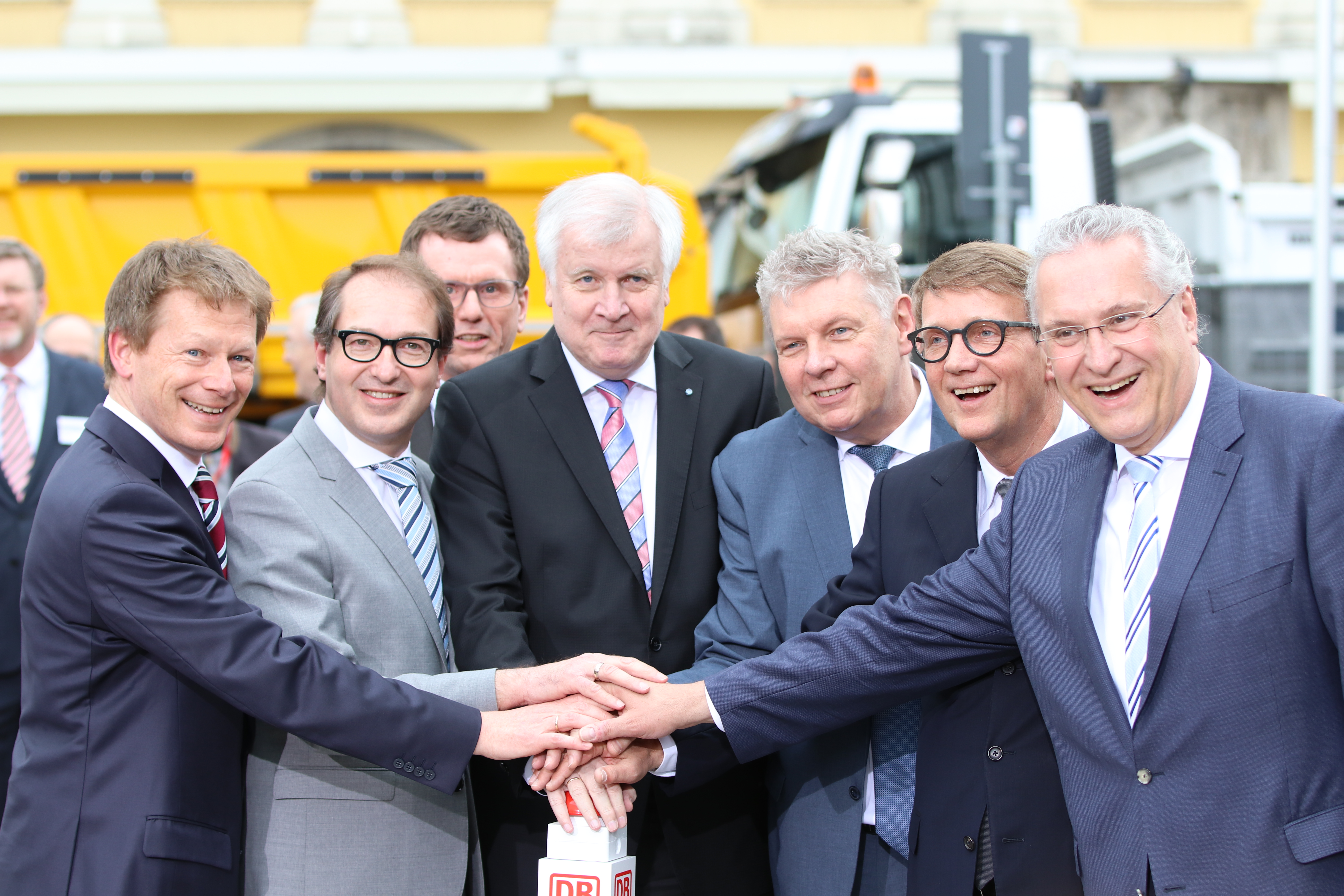 1. Spatenstich zur 2.-S-Bahn-Stammstrecke in München, Richard Lutz, CEO der Deutschen Bahn AG, Alexander Dobrindt, Bundesverkehrsminister, Horst Seehofer, Bayerischer Ministerpräsident, Dieter Reiter, Münchner Oberbürgermeister, Ronald Pofalla, Infrastruktur-Vorstand der Deutschen Bahn AG, Joachim Herrmann, Bayerischer Staatsminister für Inneres und Verkehr.